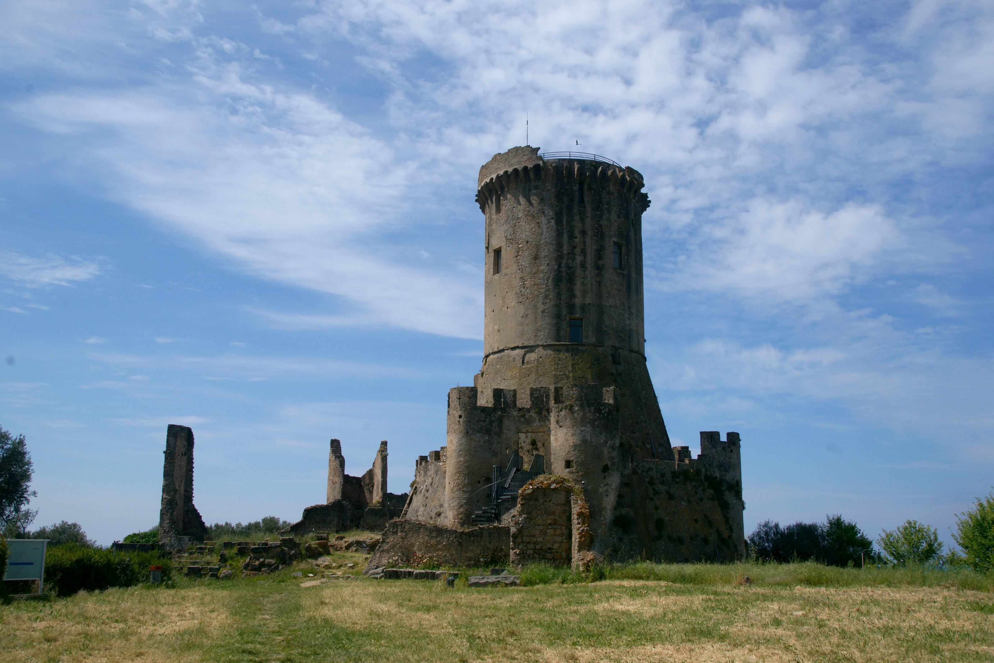 Elea - Velia: angiovinischer Turm